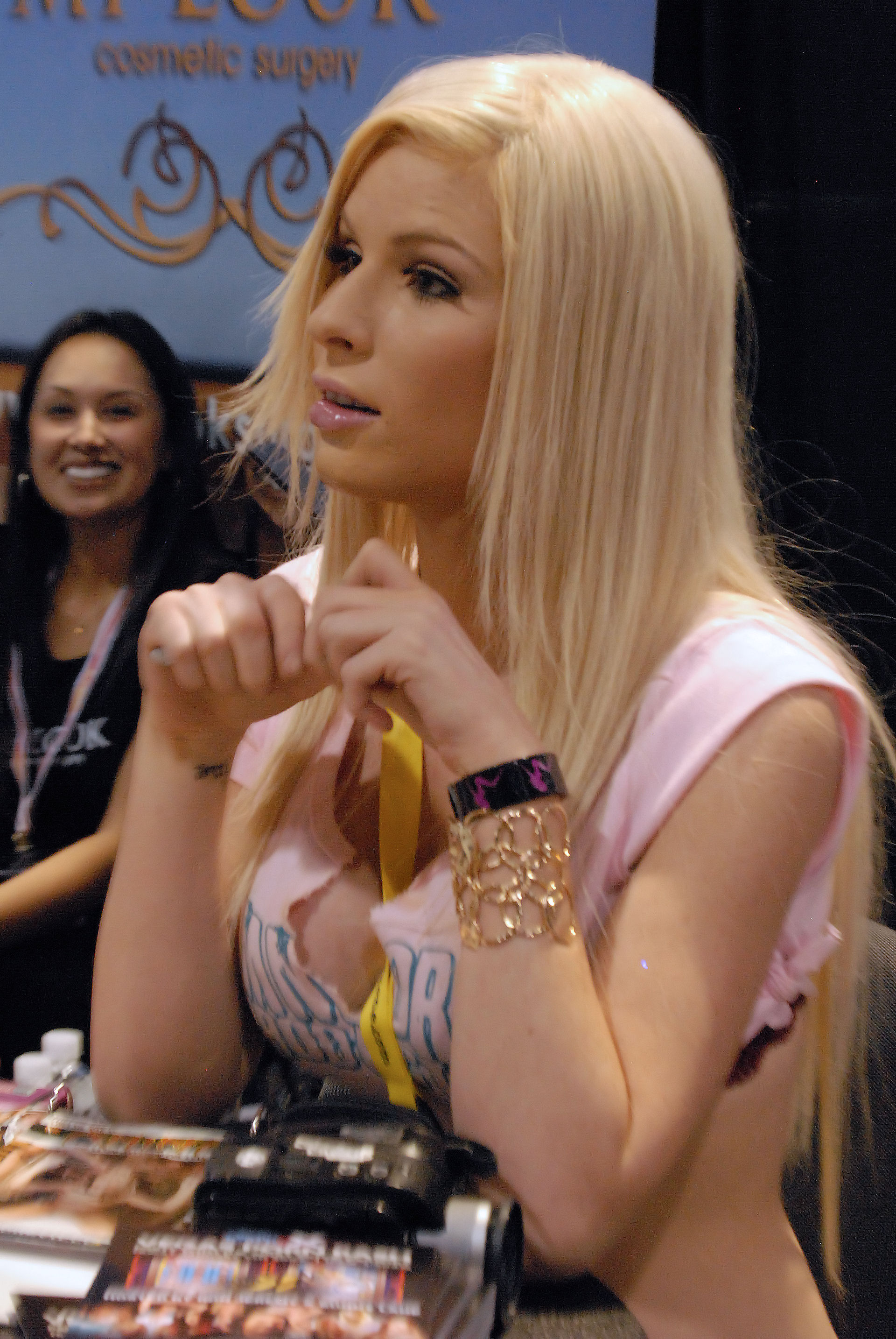 Kenzi Marie at AVN Adult Entertainment Expo 2009